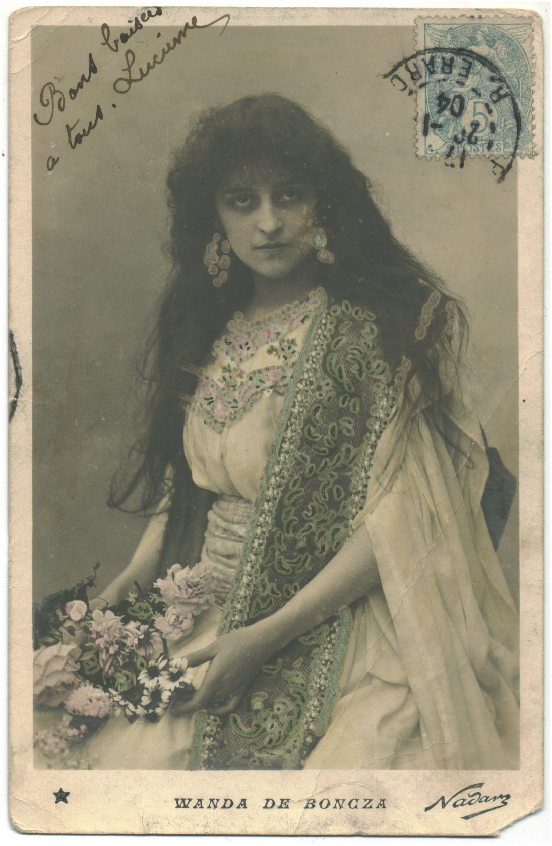 BONCZA, Wanda de_Étoile. 758-64. Photo Nadar